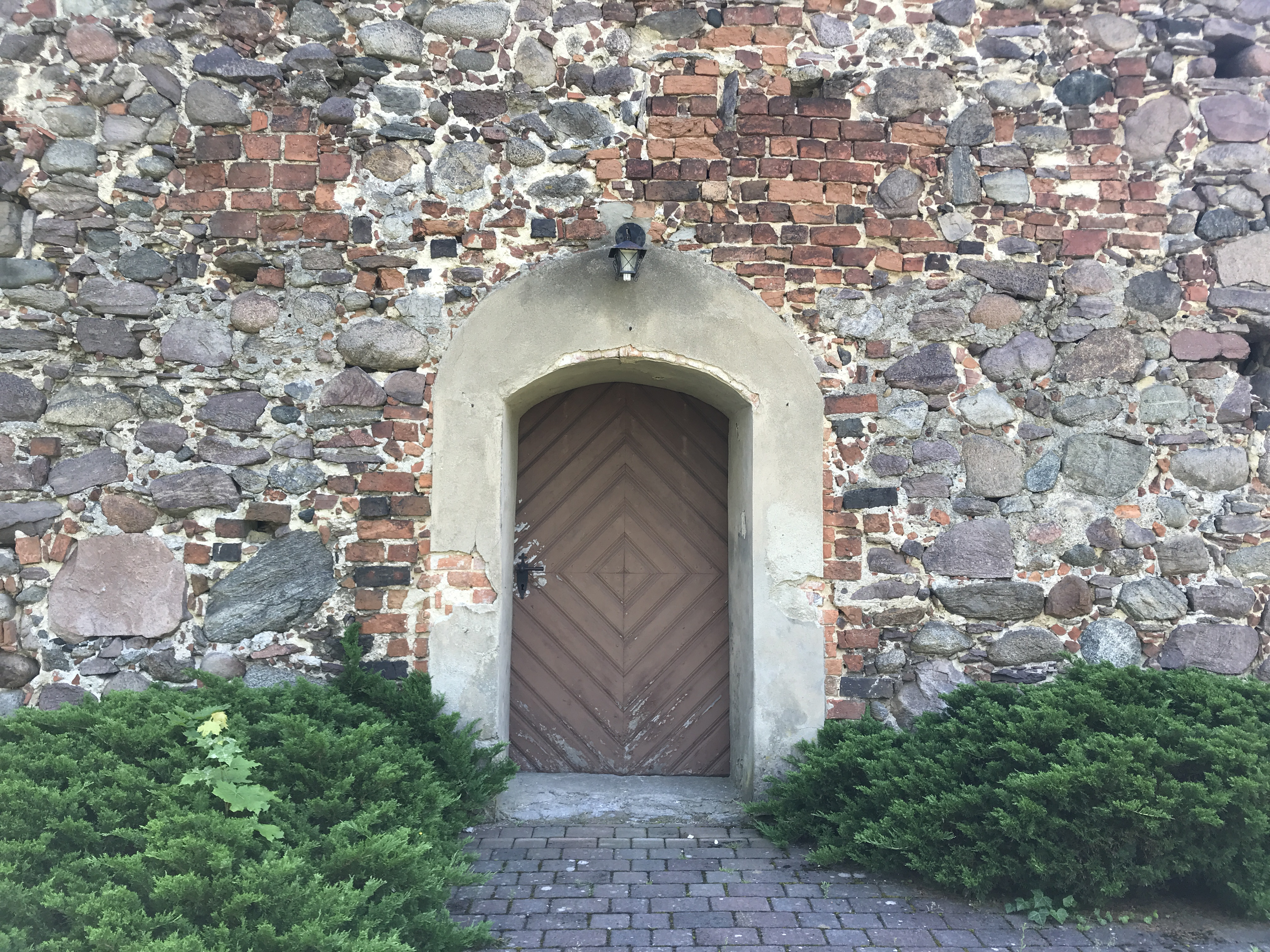 Die Dorfkirche Merz der Gemeinde Ragow-Merz im Landkreis Oder-Spree ist eine spätgotische Feldsteinkirche. Im Innern steht unter anderem ein spätbarocker Kanzelaltar mit einem Korb aus der ersten Hälfte des 17. Jahrhunderts.